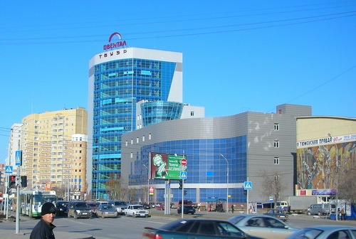 La oficejo de la kompanio TNK-BP (Tjumeno, Rusio) Офисный центр «Овентал Тауэр» на ул. Осипенко (офис компании ТНК-BP)